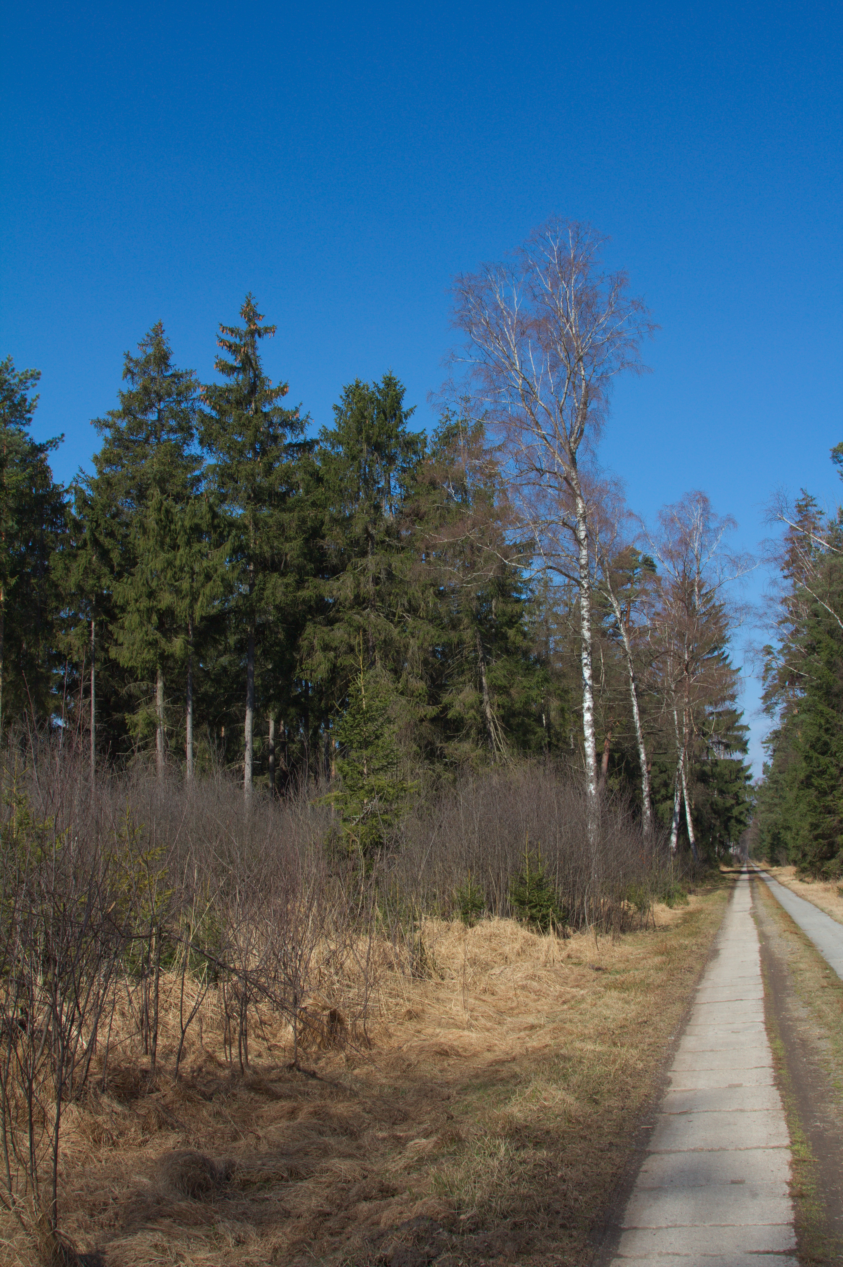 PP Soví les - cesta